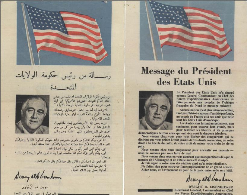 במלחמת העולם השנייה במהלך מבצע לפיד בשנת 1942, פוזרו עלונים ברחובות קזבלנקה במרוקו על ידי כוחות הברית שקראו לאוכלוסייה בצרפתית וערבית לשתף פעולה עם כוחות הברית עלון זה נשמר על ידי ילדה יהודיה שגרה בקזבלנקה והצילום הועבר לשם העלה לויקיפדיה